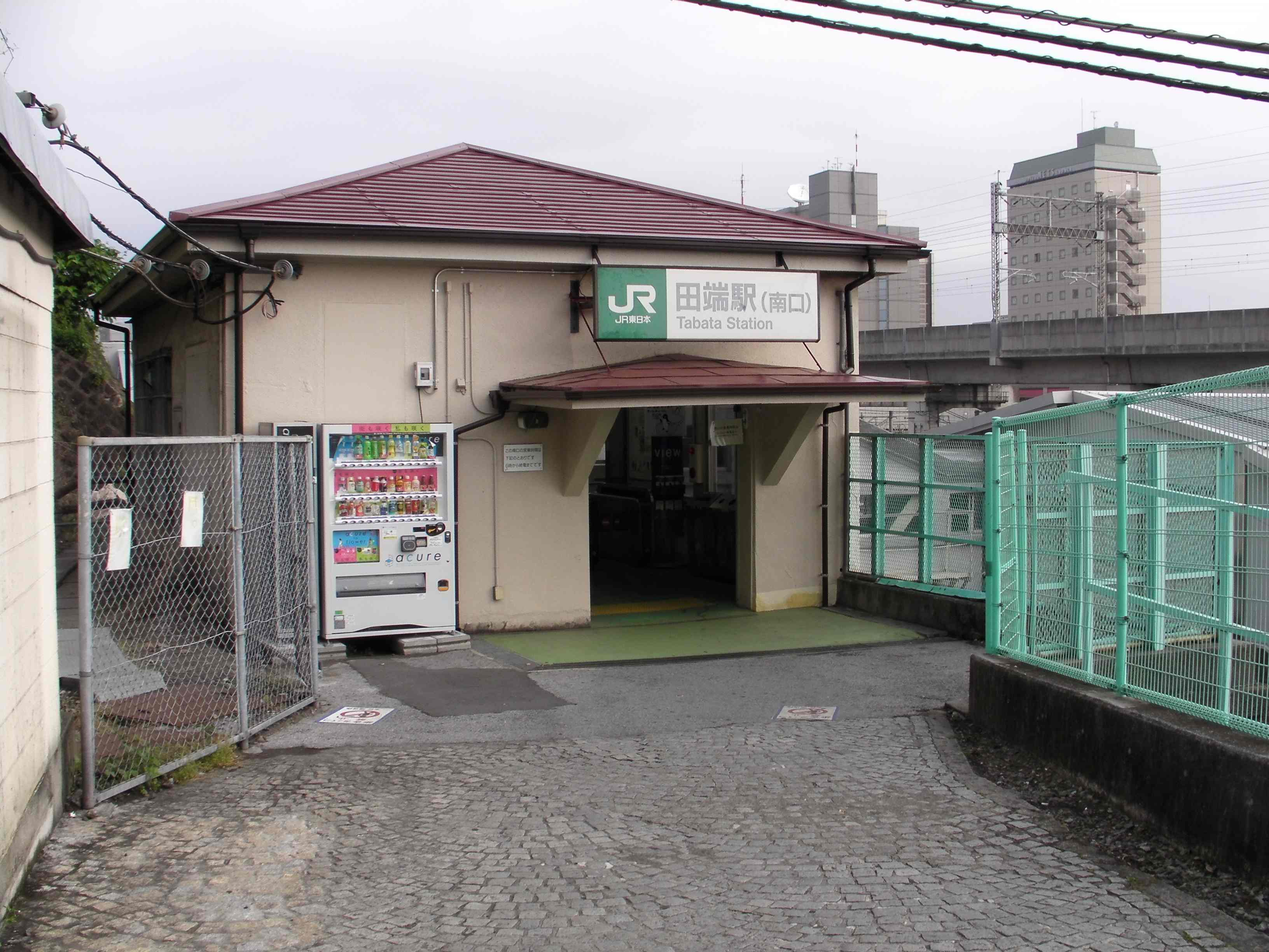 Tabata Station